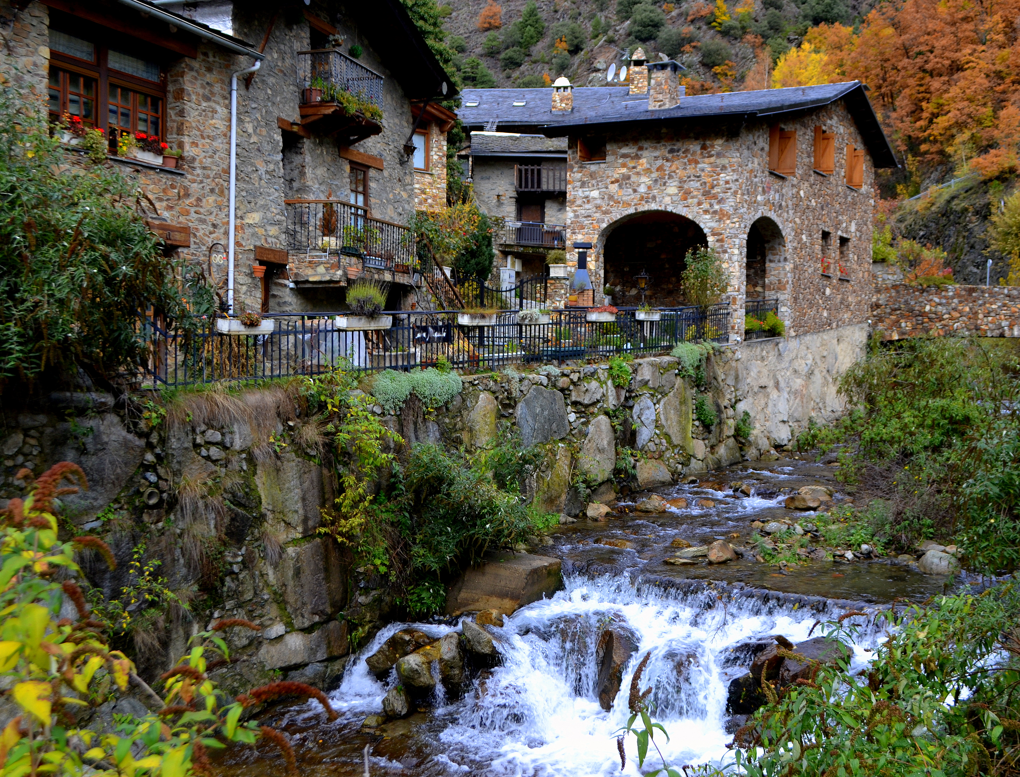 Riu d'Os al seu pas per Bixessarri, Sant Julià de Lòria, Andorra This is a a photo of a river in Andorra with id: IEA-R-13